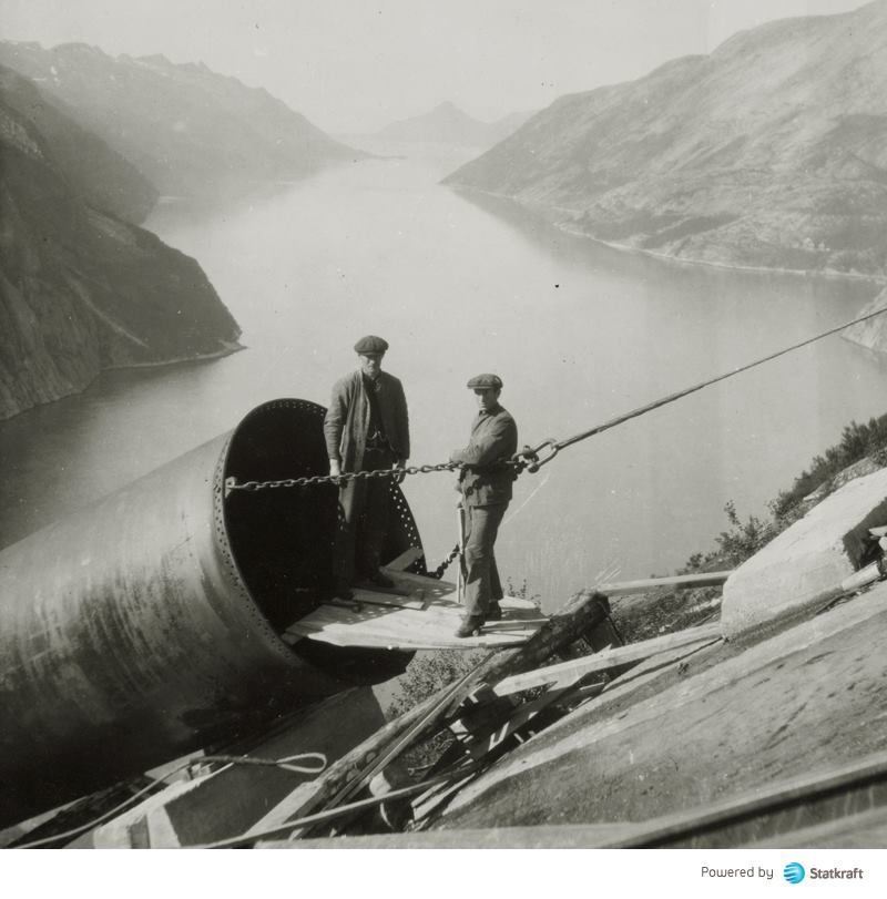 construction